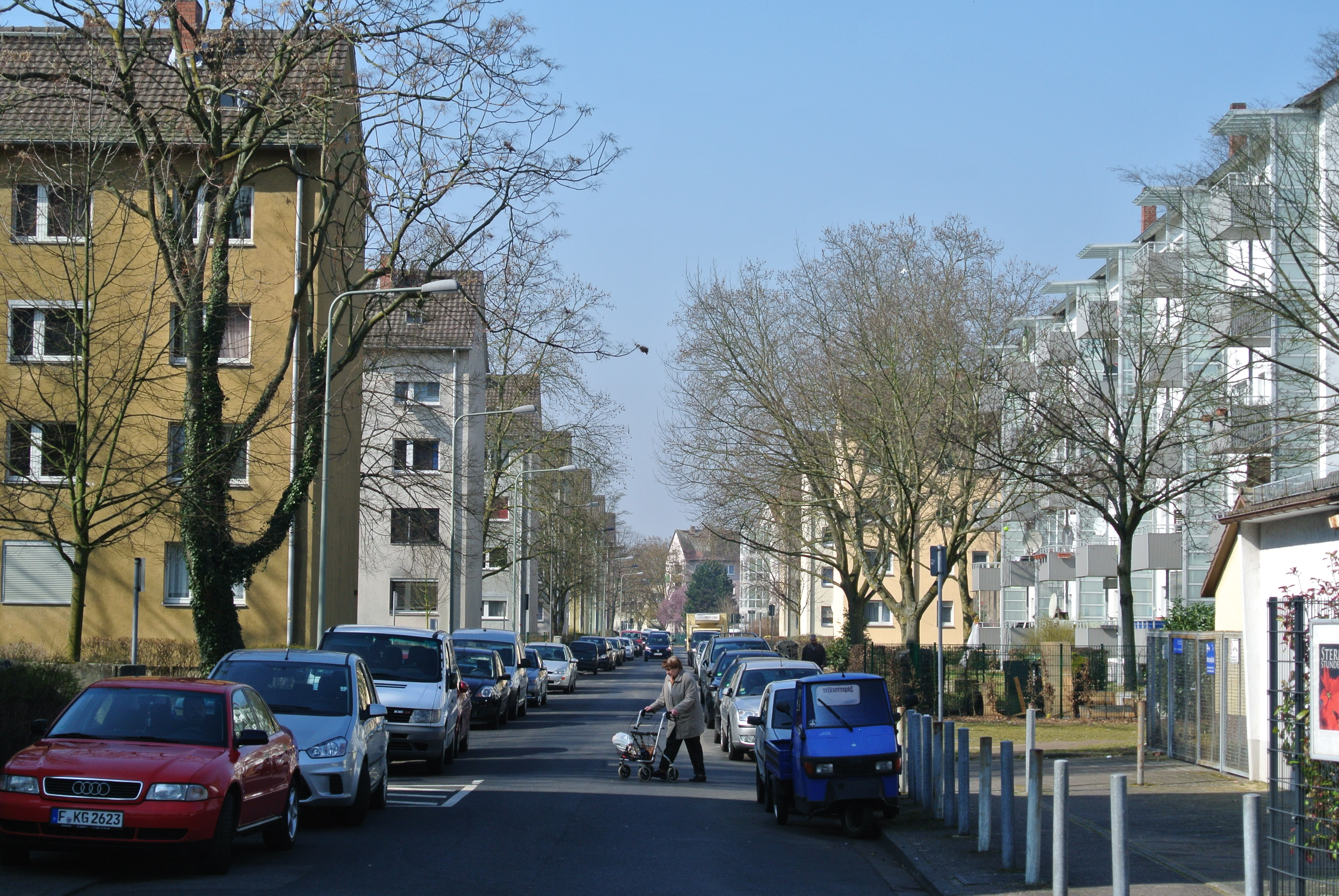 Eduard-Wildermuth-Siedlung in Frankfurt-Griesheim nördlich der Mainzer Landstraße, ab 1950 errichtet, Bingelsweg / Waldschulstraße